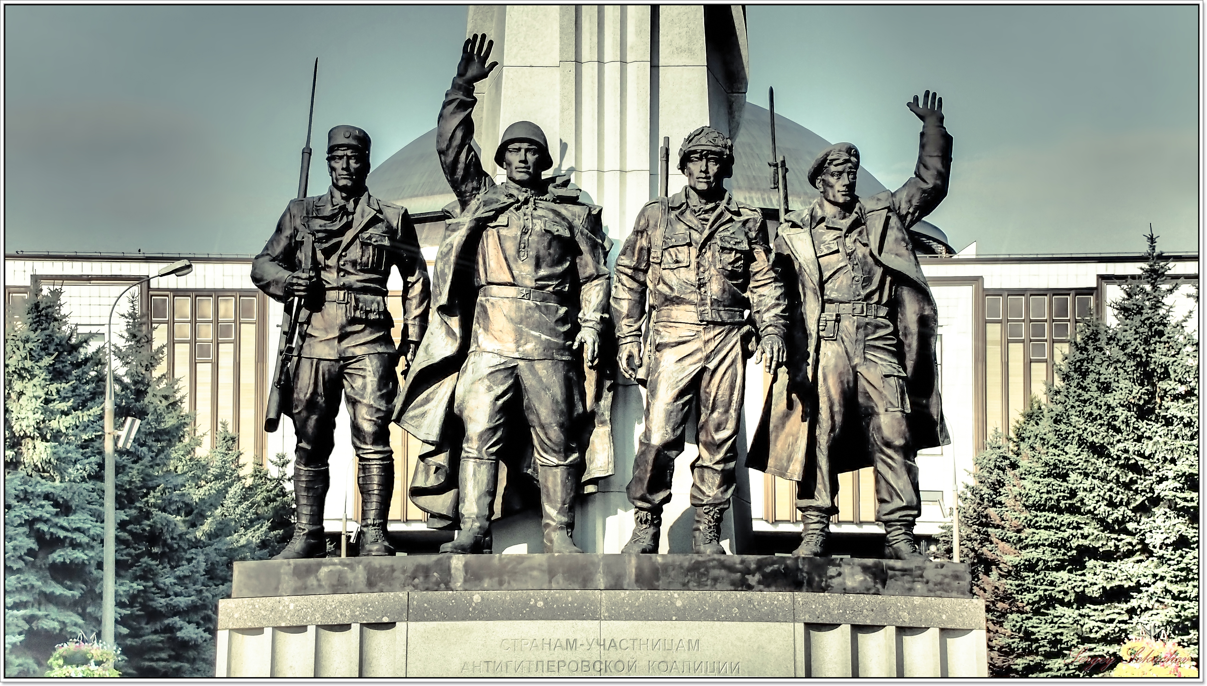 Памятник Воинам-интернационалистам на Поклонной горе.